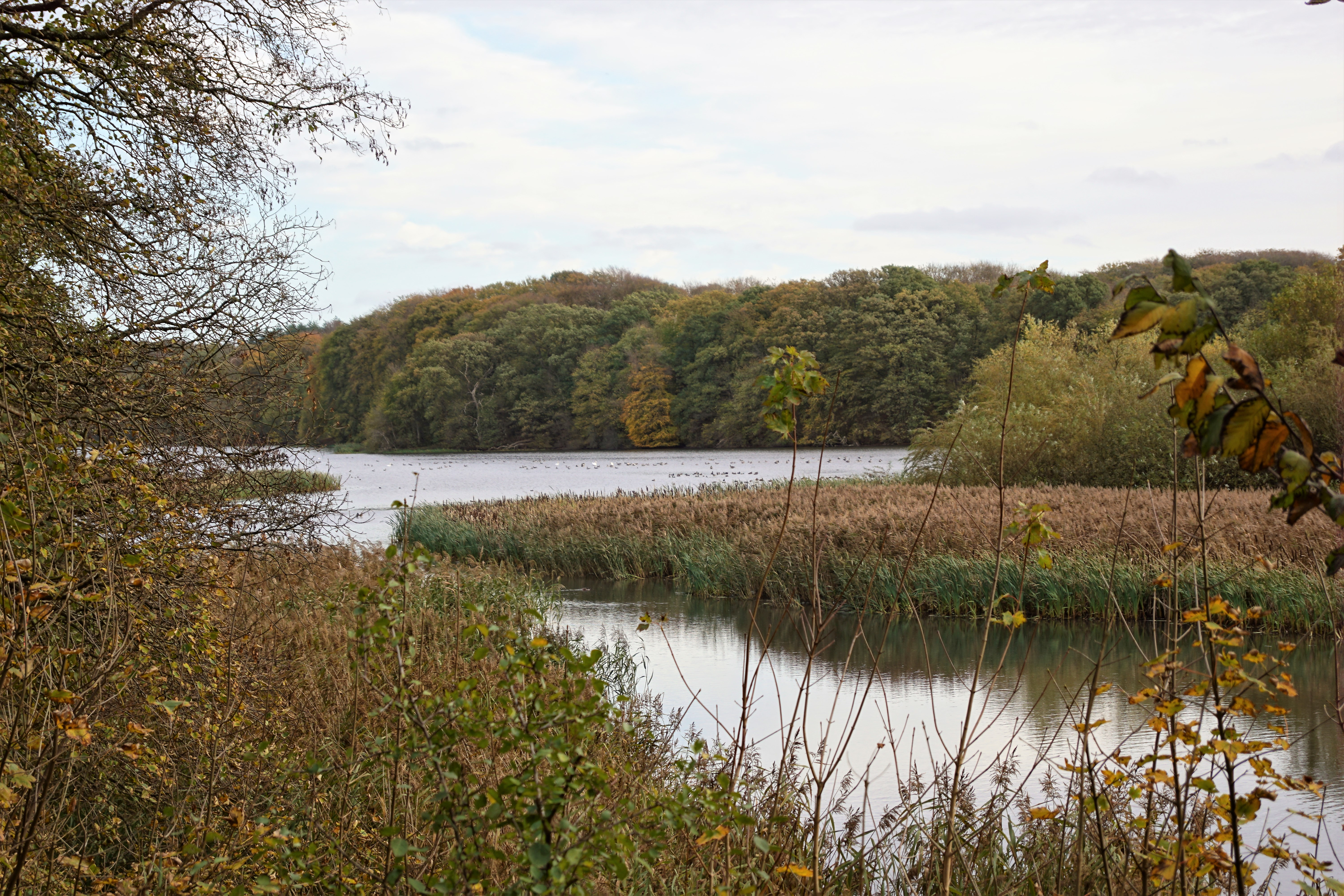 Bygholm Sø vestenden set mod sydøst